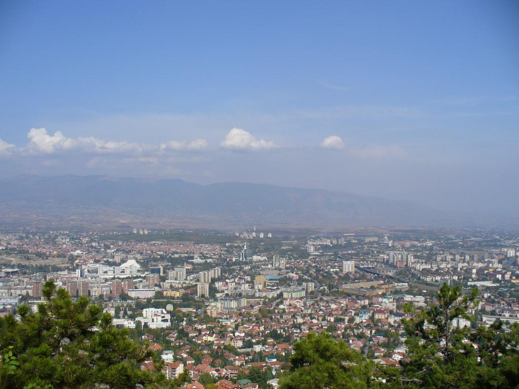 Skopje, Macedonia